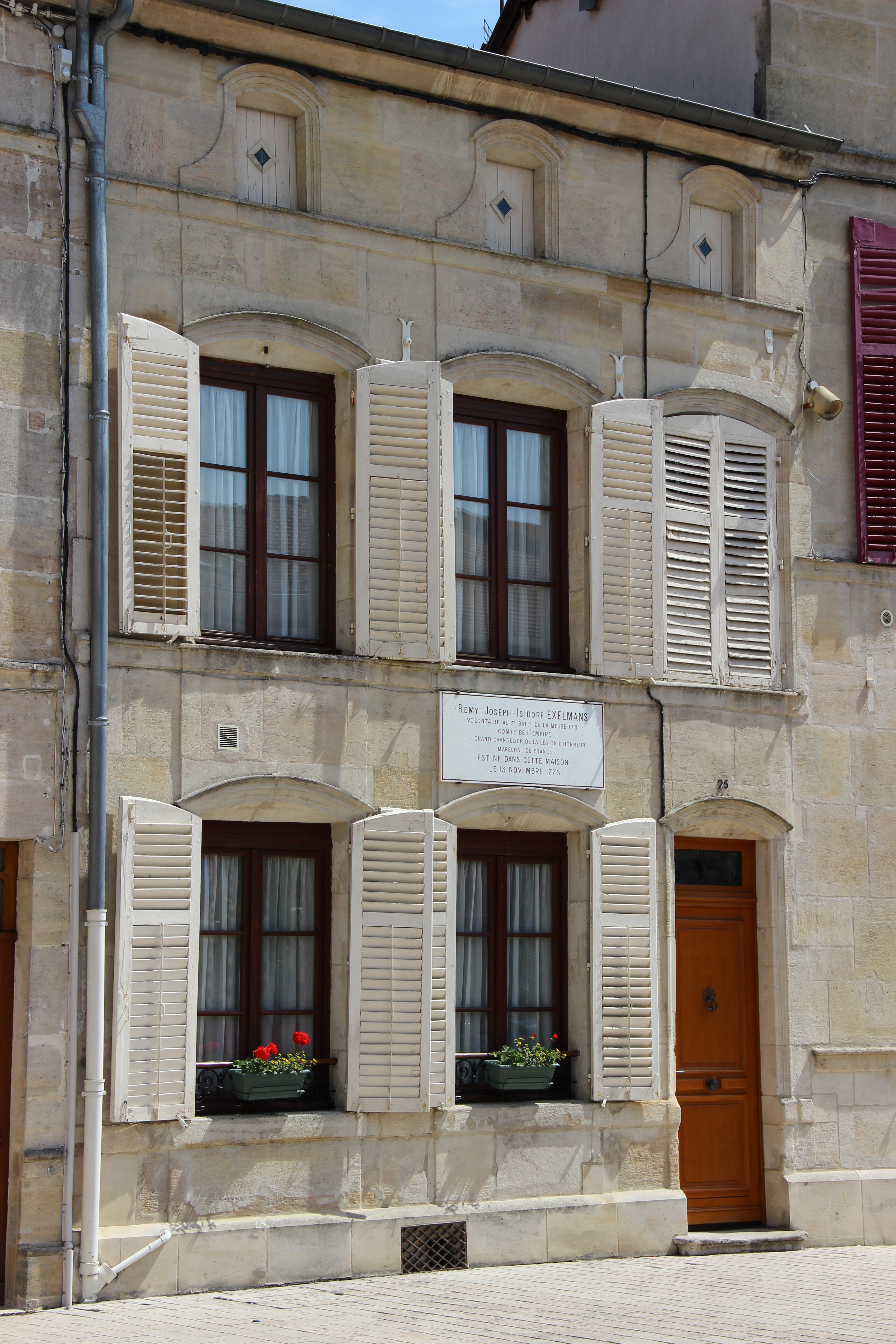 La maison natale du Maréchal Exelmans dans la rue Bar-la-Ville